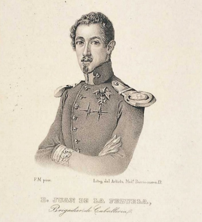 Retrato de Juan de la Pezuela, político de ideas conservadoras, militar, escritor y poeta peruano. Pintado por Federico de Madrazo y Kuntz.